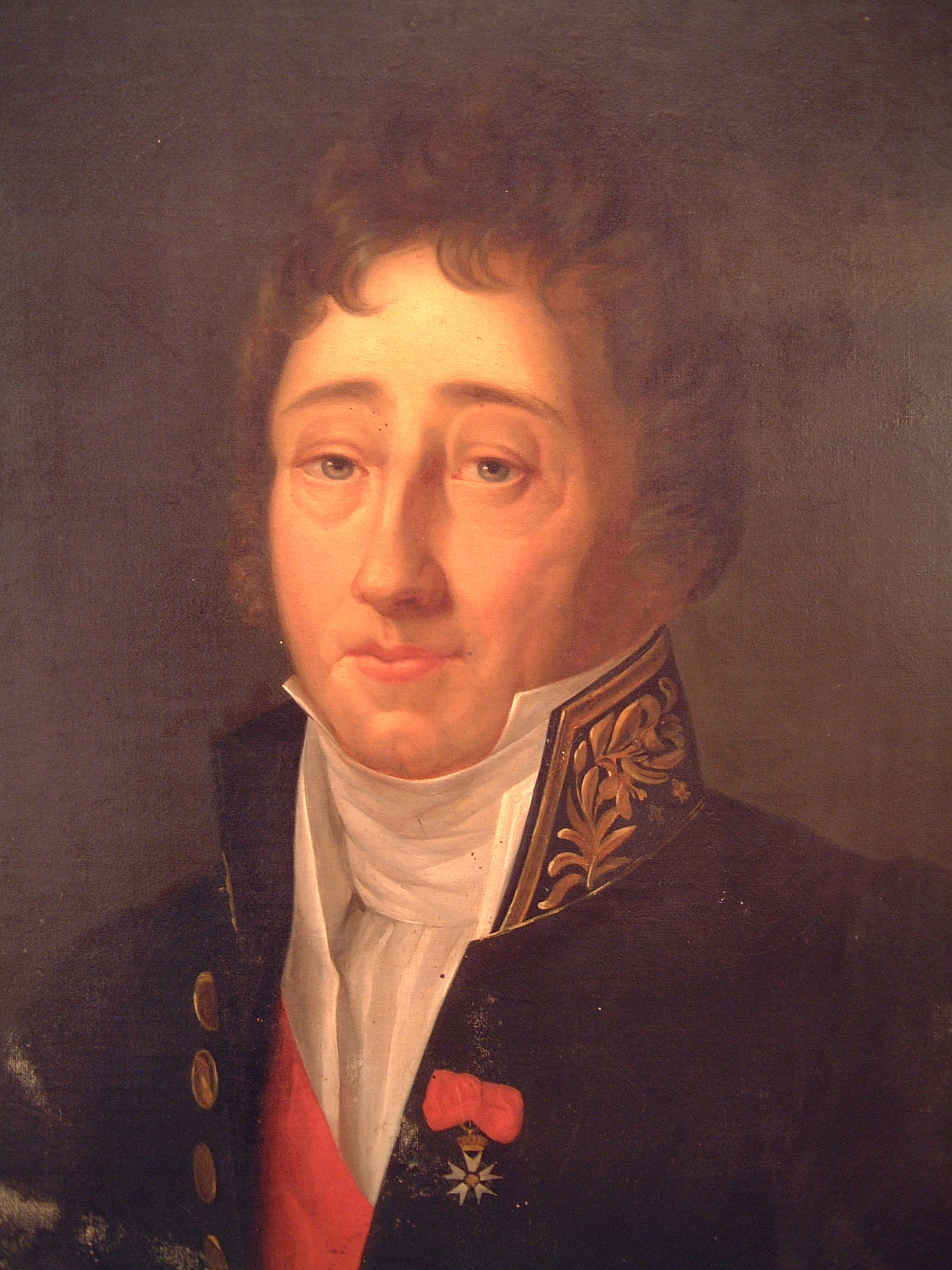 Bernard-Emmanuel de Roux, marquis de Puivert, Baron et Pair de France, Chevalier de la Légion d'honneur